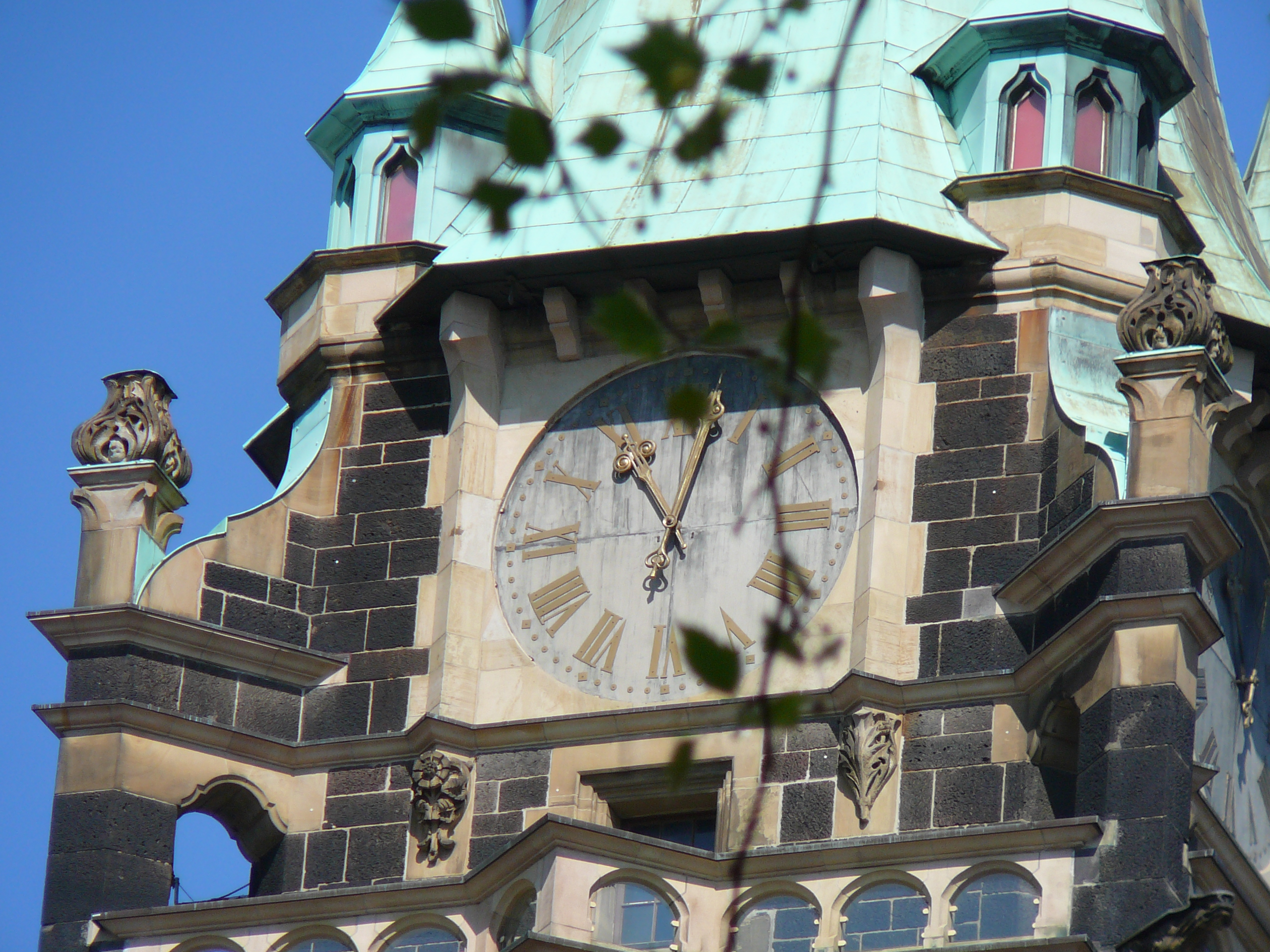 Kerstenplatz, Wuppertal